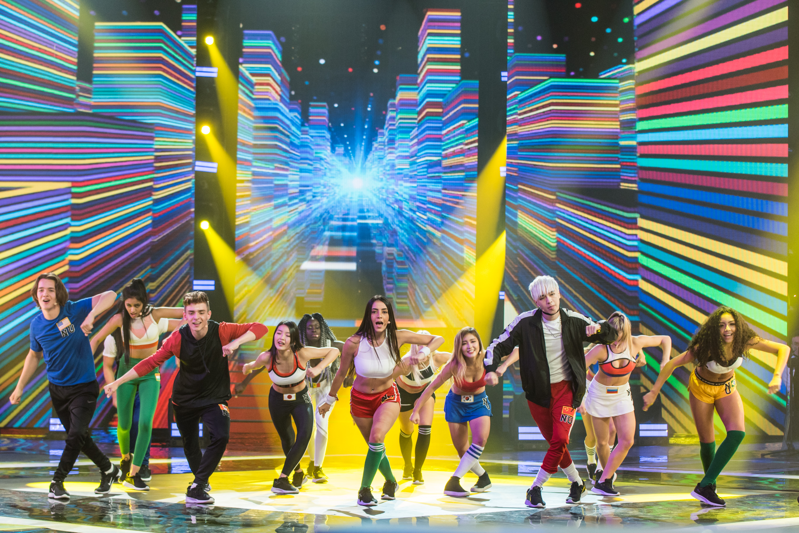 Now United на финале Голос. Дети 5